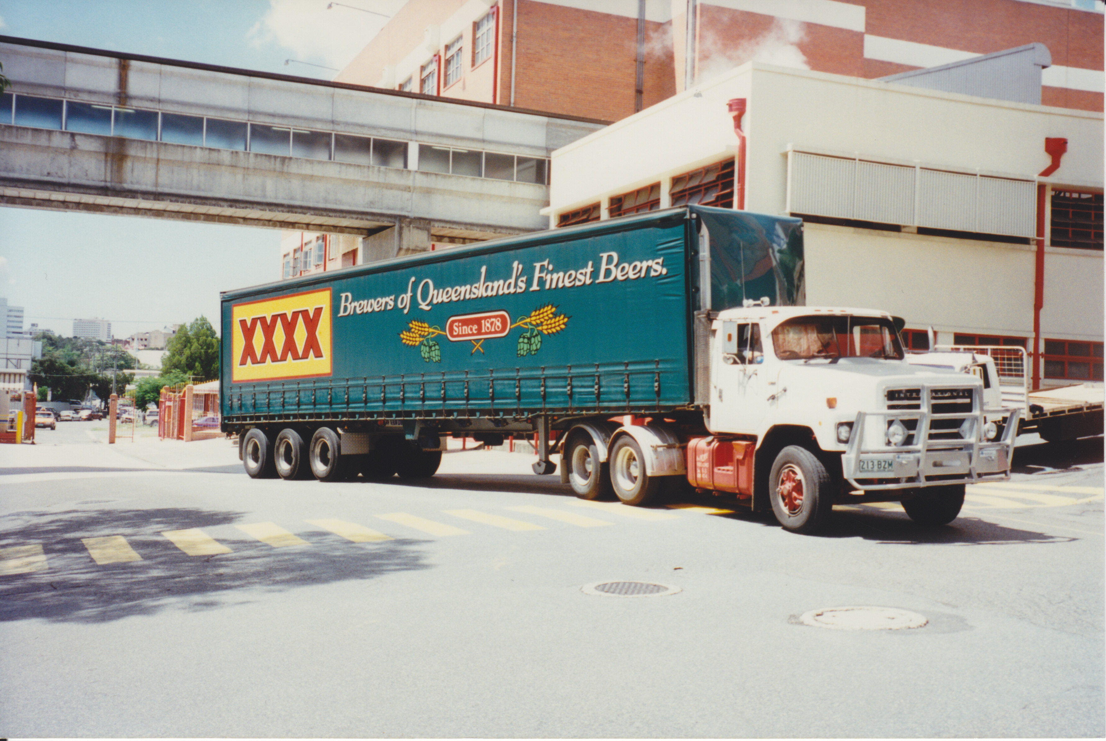 XXXX